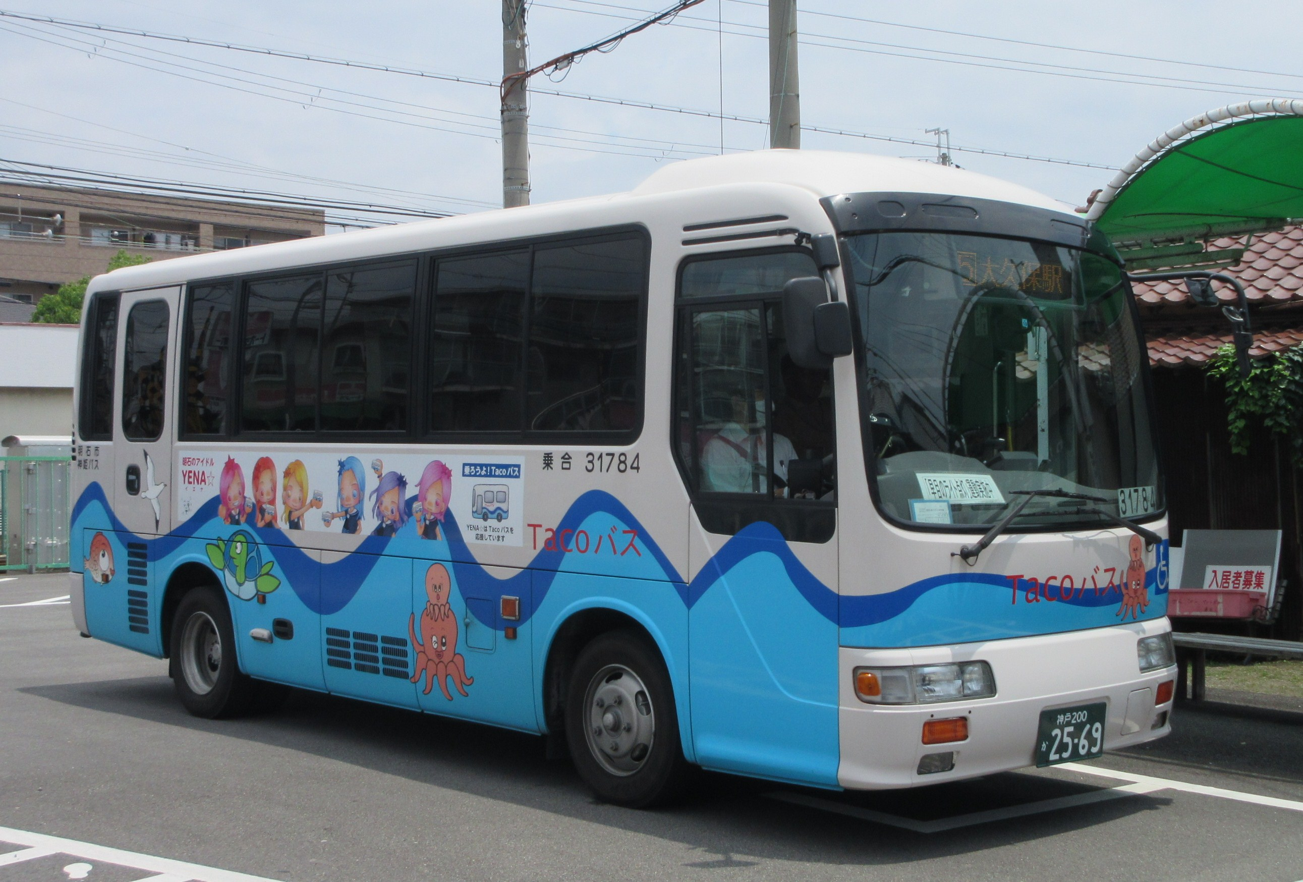 Tacoバス31784(藤江駅にて)